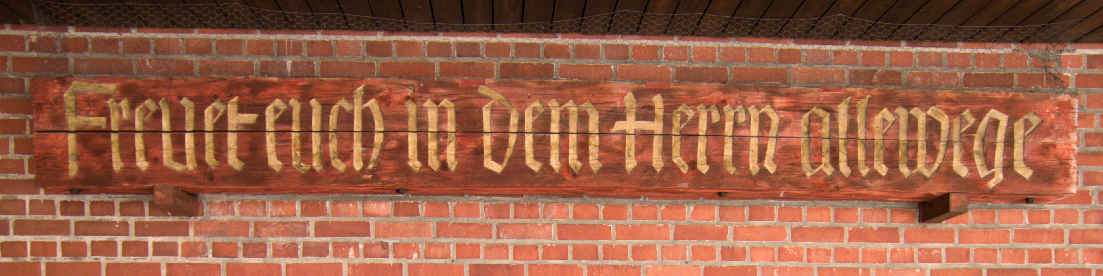 Leitspruch "Freuet euch in dem Herrn allewege" der Passionskirche München auf einem Holzbalken.